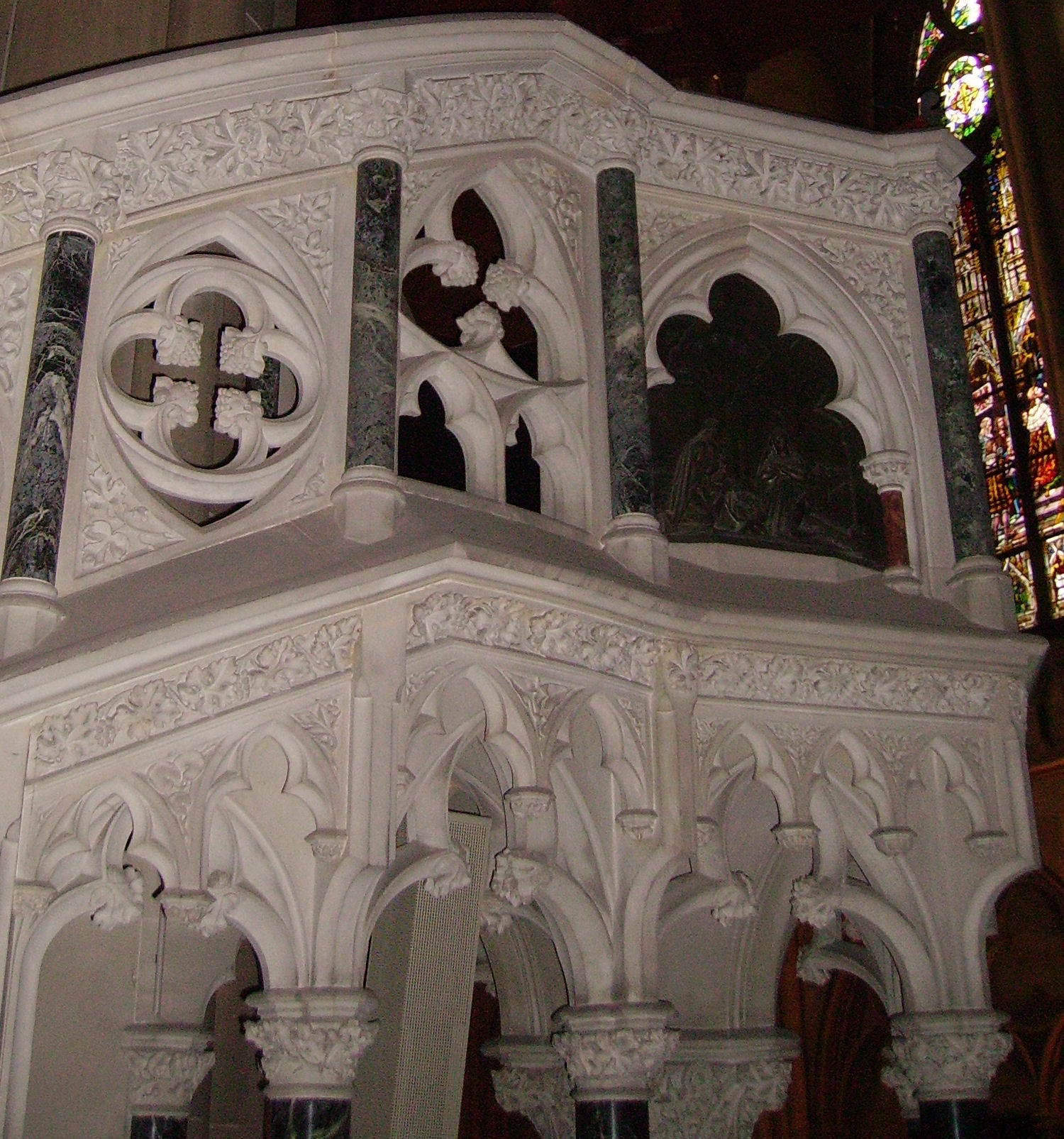 Gedächtniskirche (Memorial Church) in Speyer, Germany